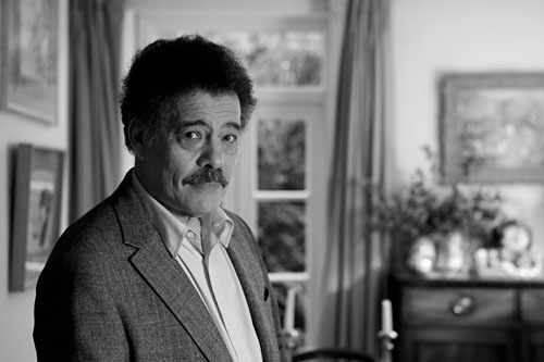 Sárközi Mátyás (Budapest, 1937. július 19. –) József Attila-díjas magyar író, kritikus, műfordító, szerkesztő.